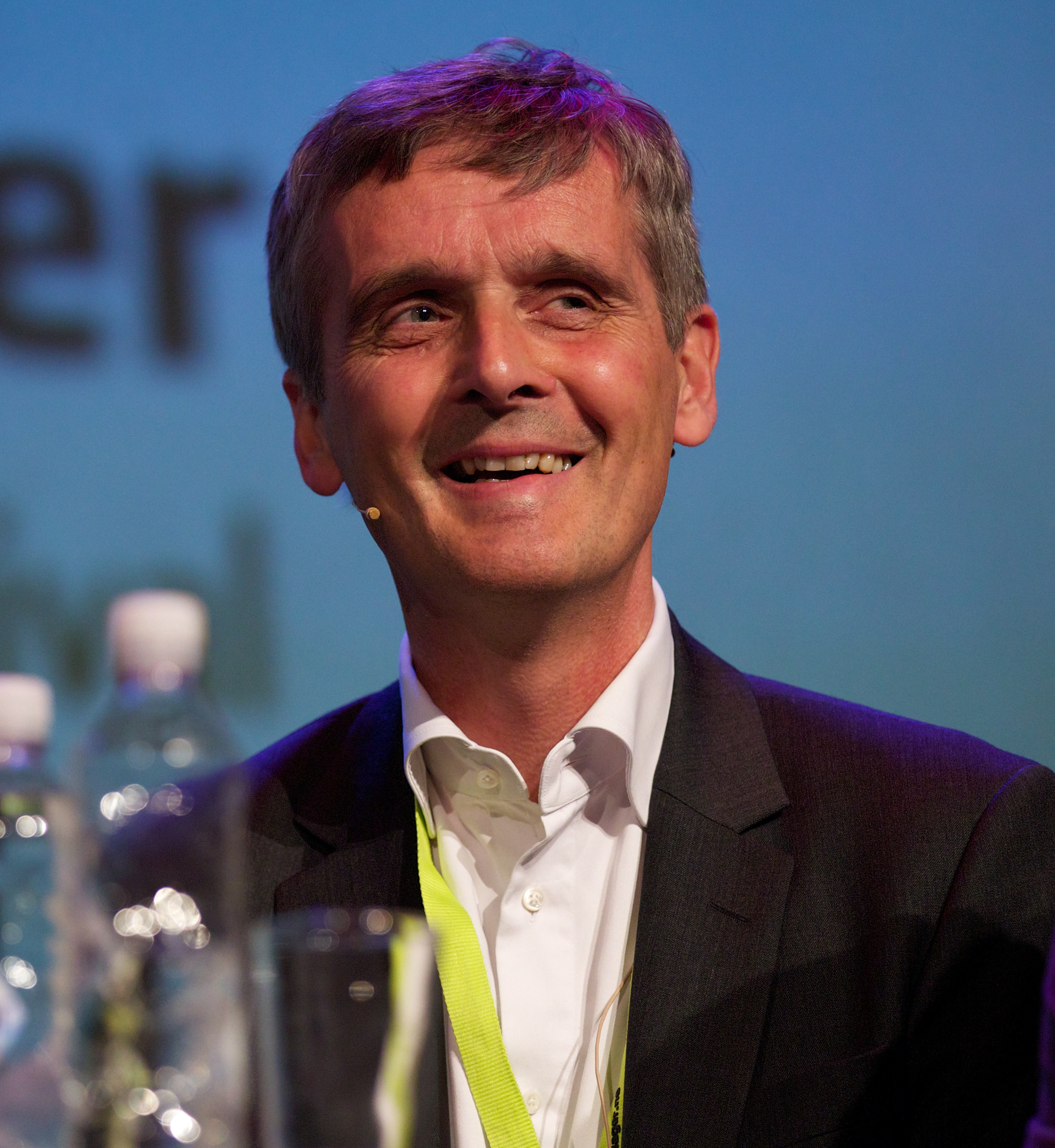 Hans-Tore Bjerkaas. Foto: Eirik Helland Urke